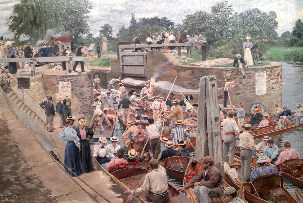 L'écluse de Molesey